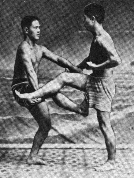 宮城長順と許田重発(Miyagi Chojun and Kyoda Juhhatsu)